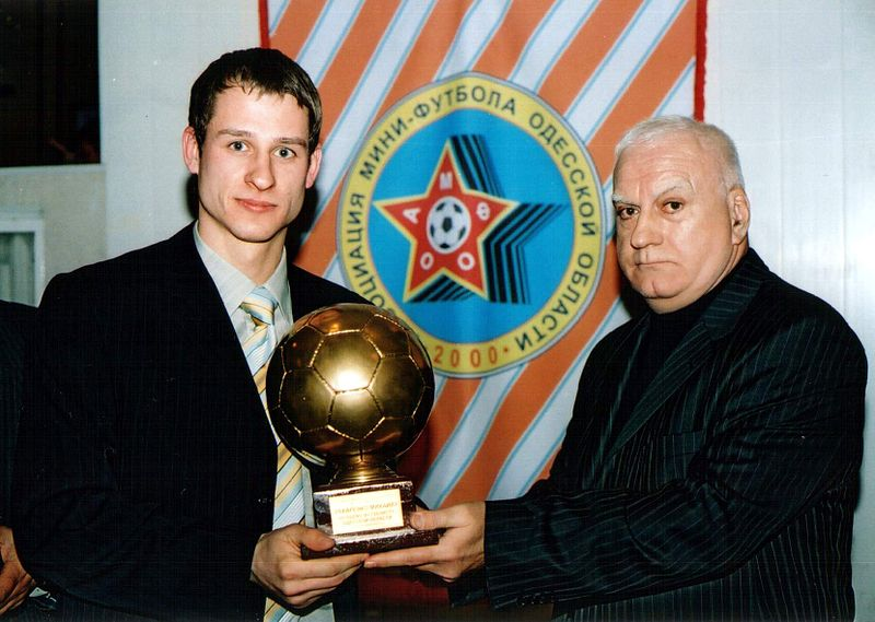 Захаренко_та_Водян: Михайло Захаренко та Валерій Водян